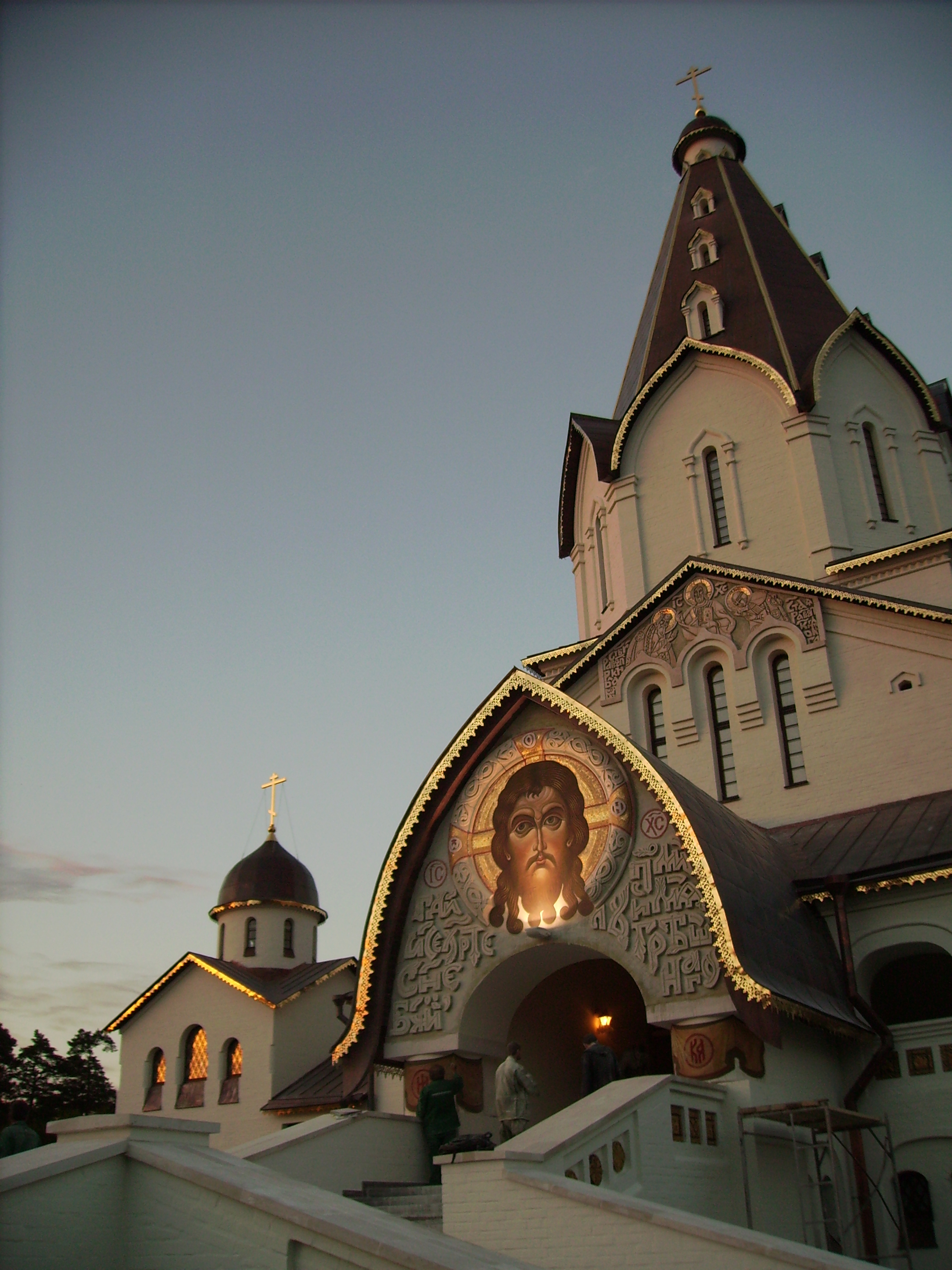 о.Валаам. Владимирский Скит, храм святого князя Владимира